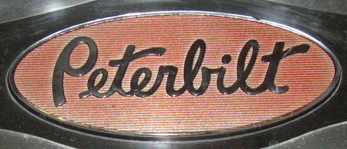 Peterbilt Logo - LKW Hersteller USA